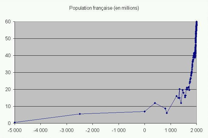 Évolution de la population française sur le long terme.